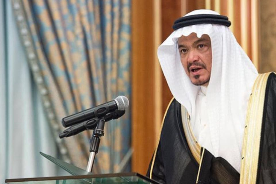 معالي وزير الحج و العمرة يؤدي القسم بين يدي خادم الحرمين الشريفين قبل قليل